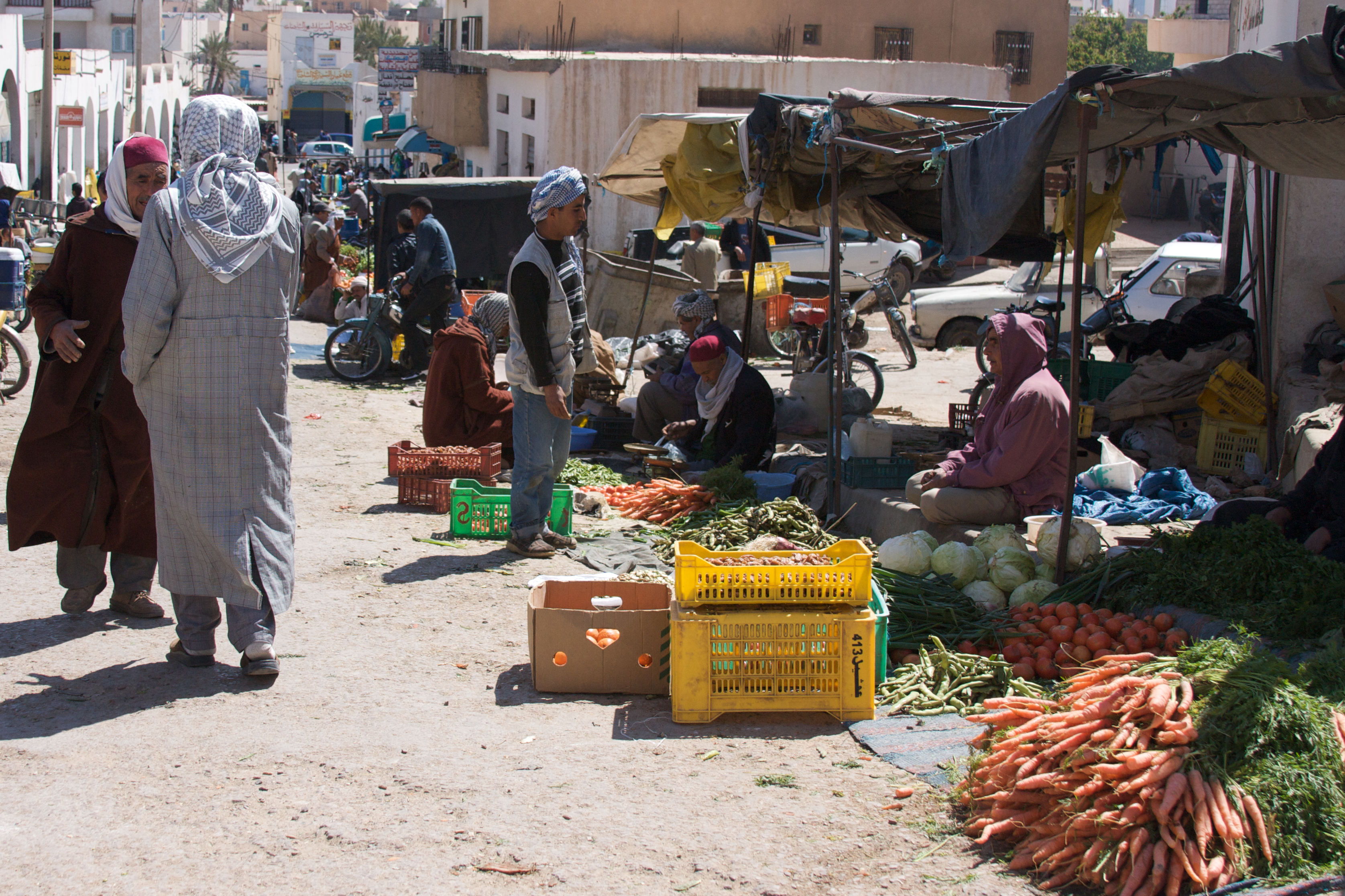 Ajim marketplace